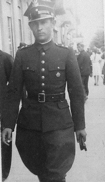 Ppor. rez. Leon Wiewiórski okolo 1939 roku